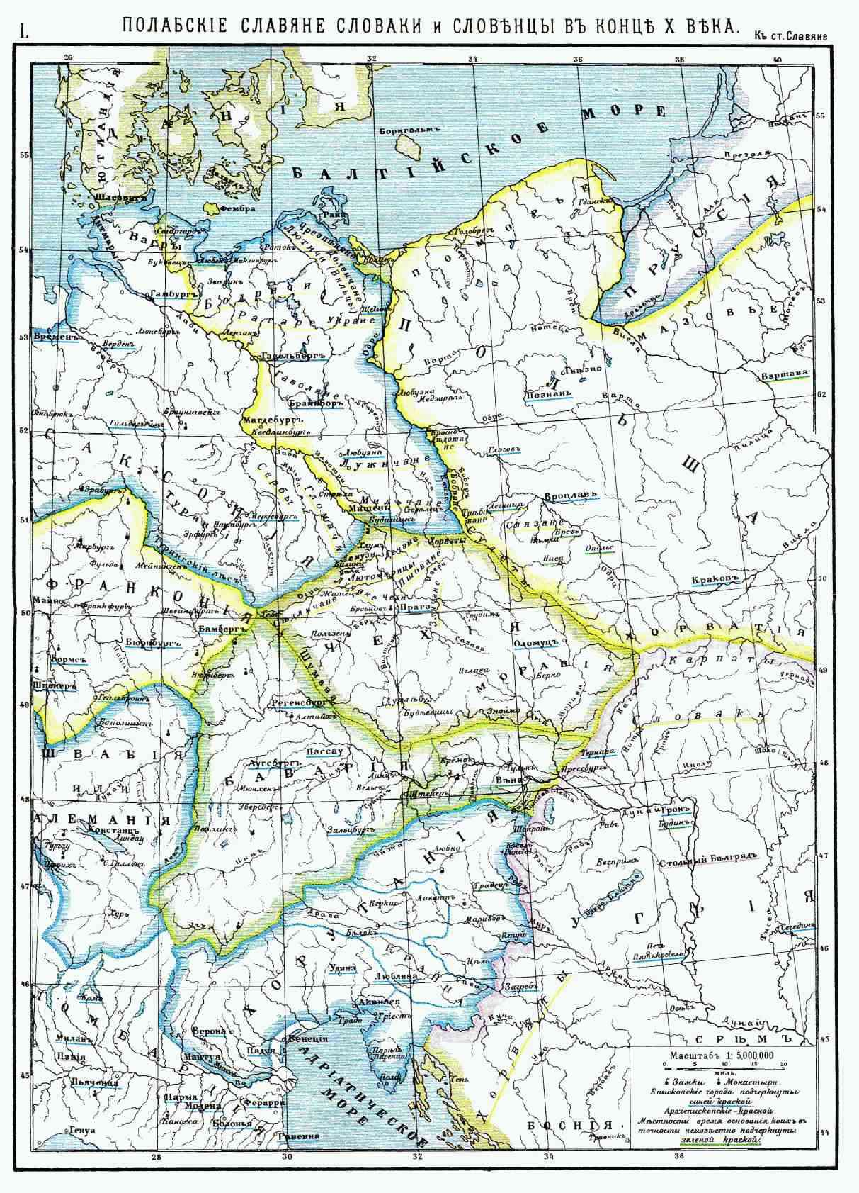 Славянские народы на карте центральной и восточной Европы в конце X века. Иллюстрация к статье славяне из энциклопедии Брокгауза и Ефрона